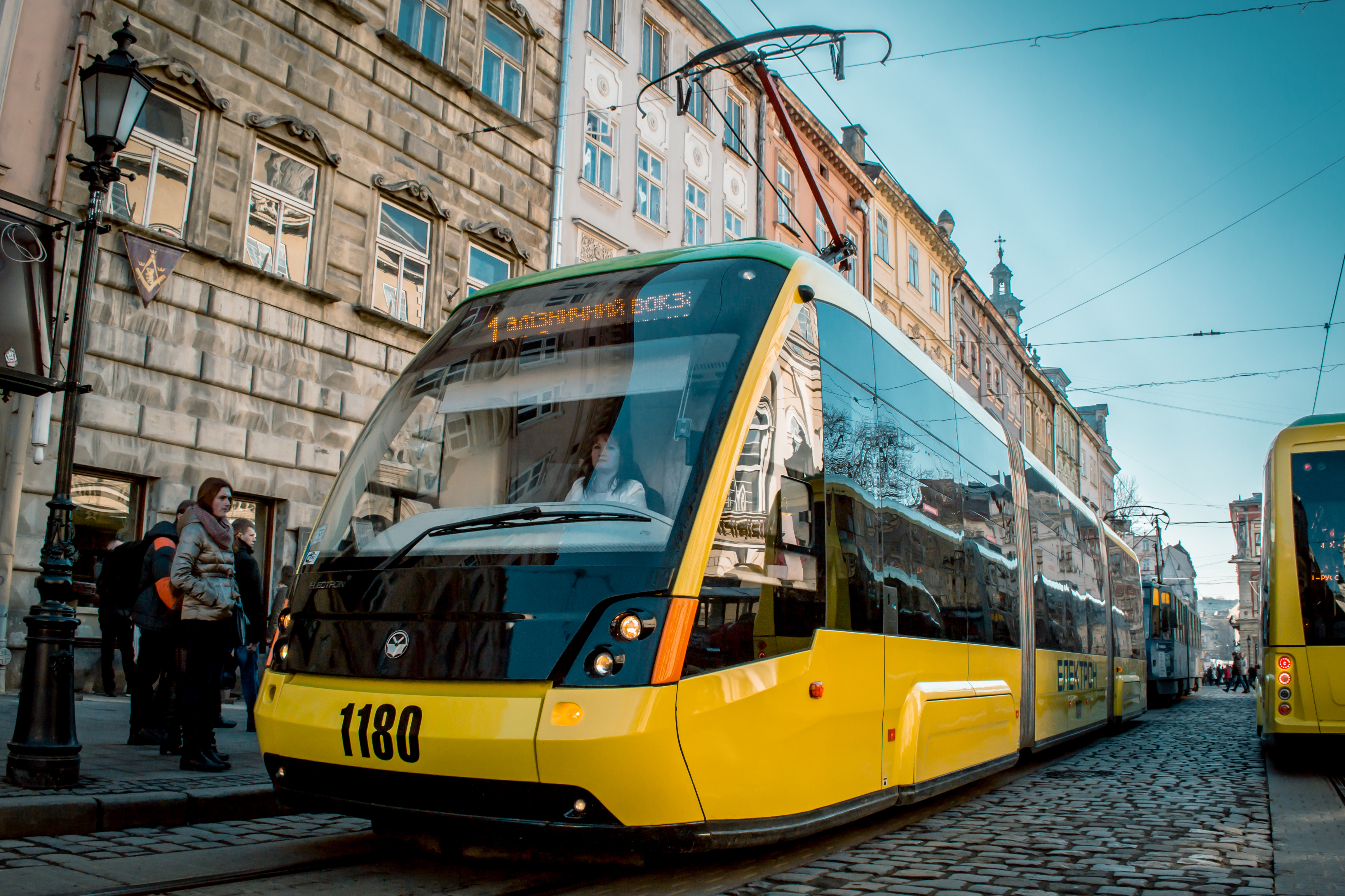 Трамвайний вагон Електрон Т3L44 на площі Ринок у Львові.